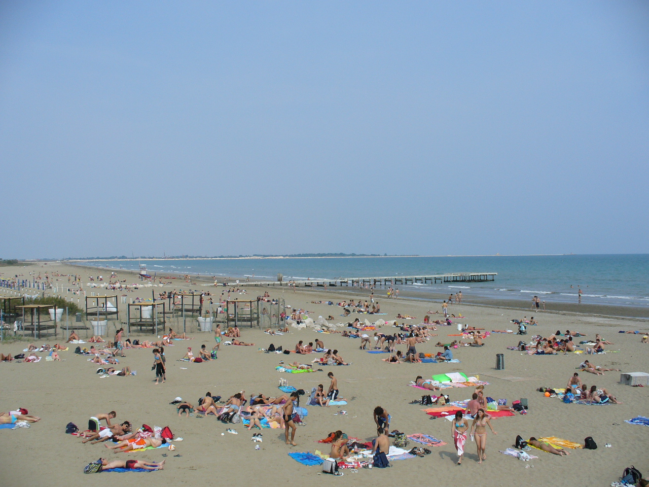 Voltada para o mar Adriático